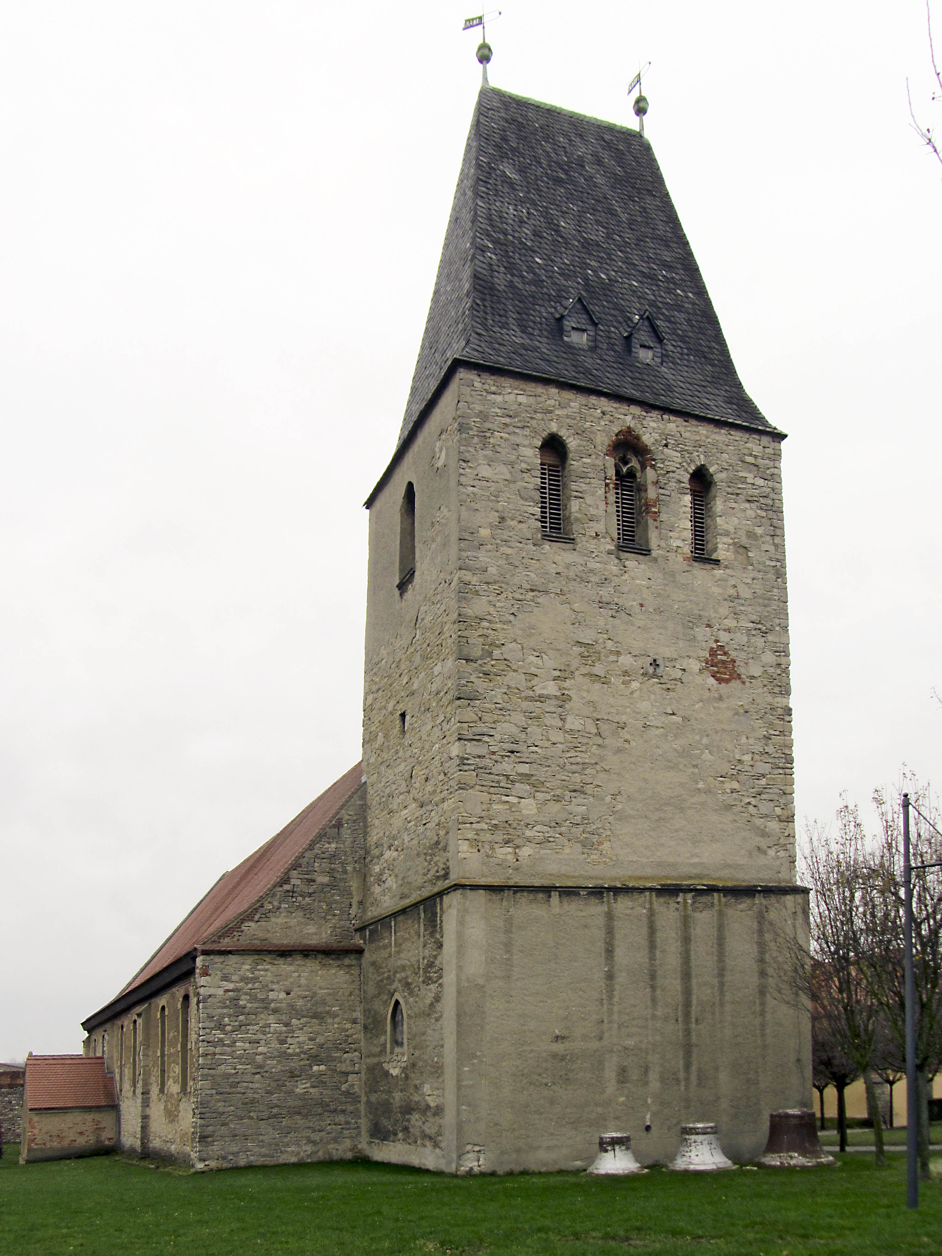 Steinkreuz eingemauert im Kirchturm von Förderstedt